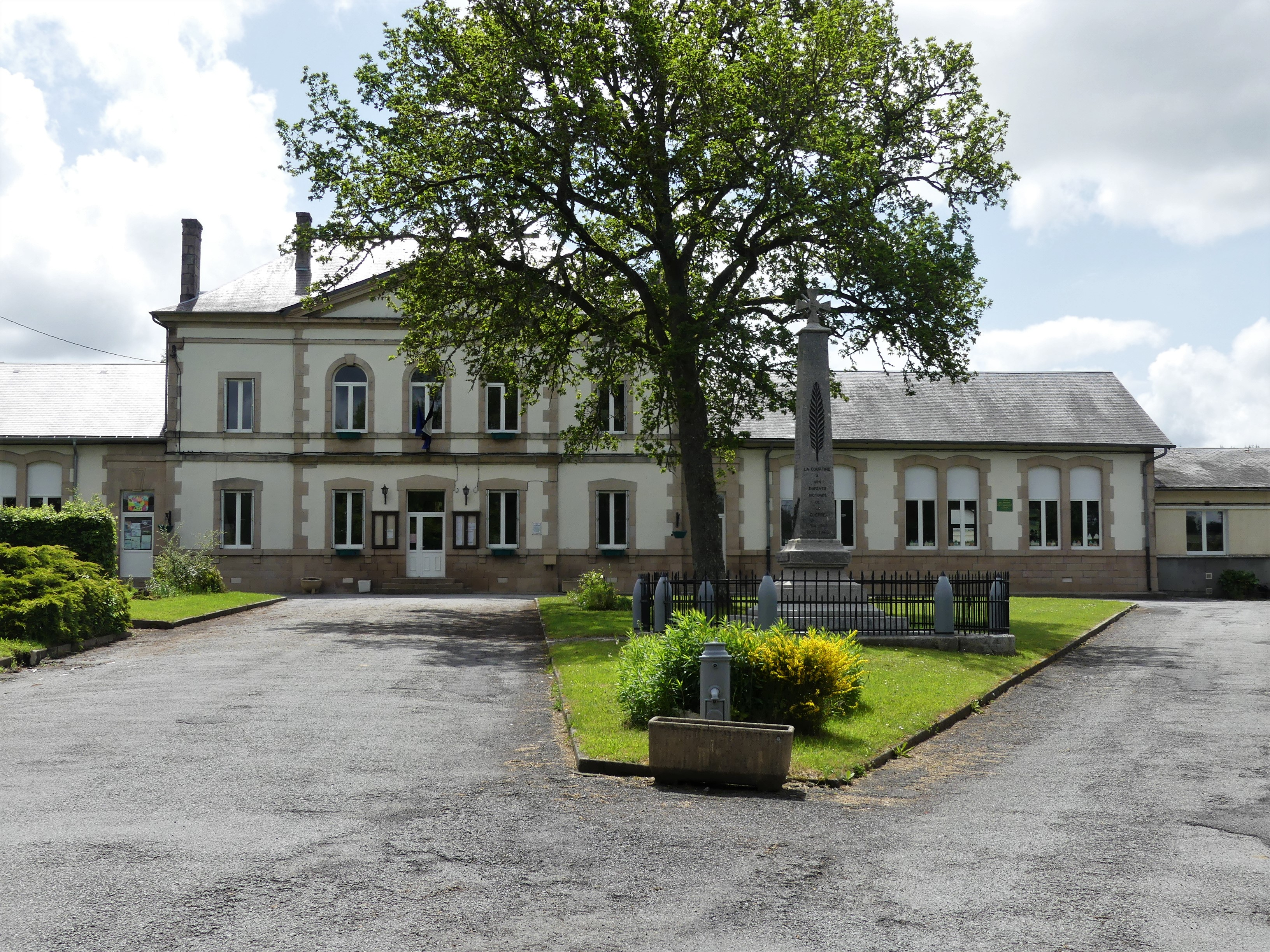 Mairie-école de La Courtine, Creuse, France.